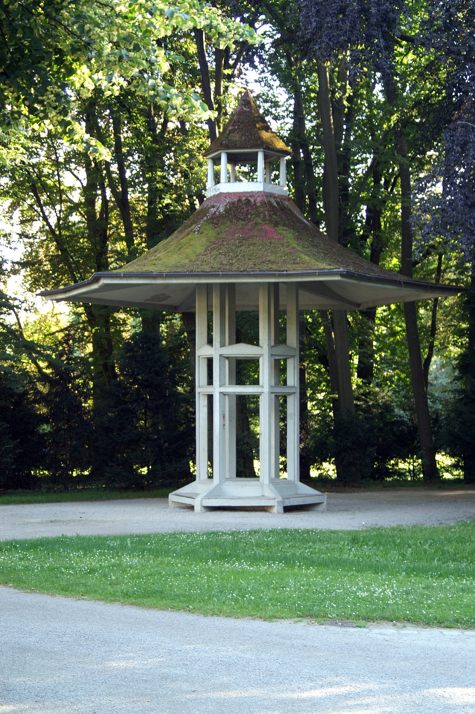 Pavillon im Stadtpark Regensburg. Erster Stahlbetonbau in Regensburg um 1910